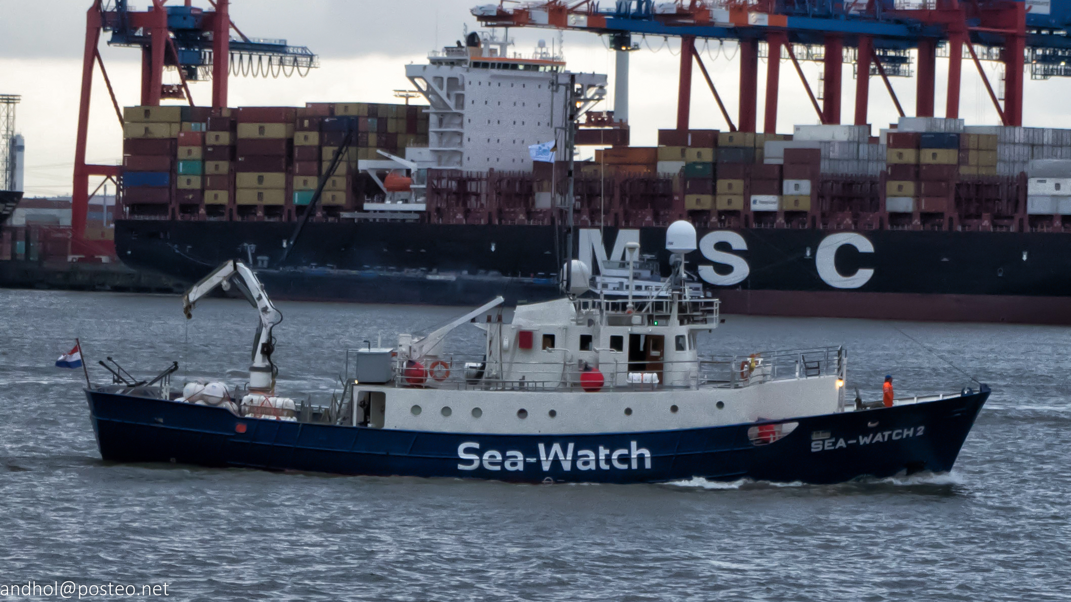 Sea-Watch 2 verlässt Hamburg am 21.3.2016, einen Tag nach der Taufe, Richtung Mittelmeer zum ersten Einsatz zur Rettung schiffbrüchiger Flüchtlinge.